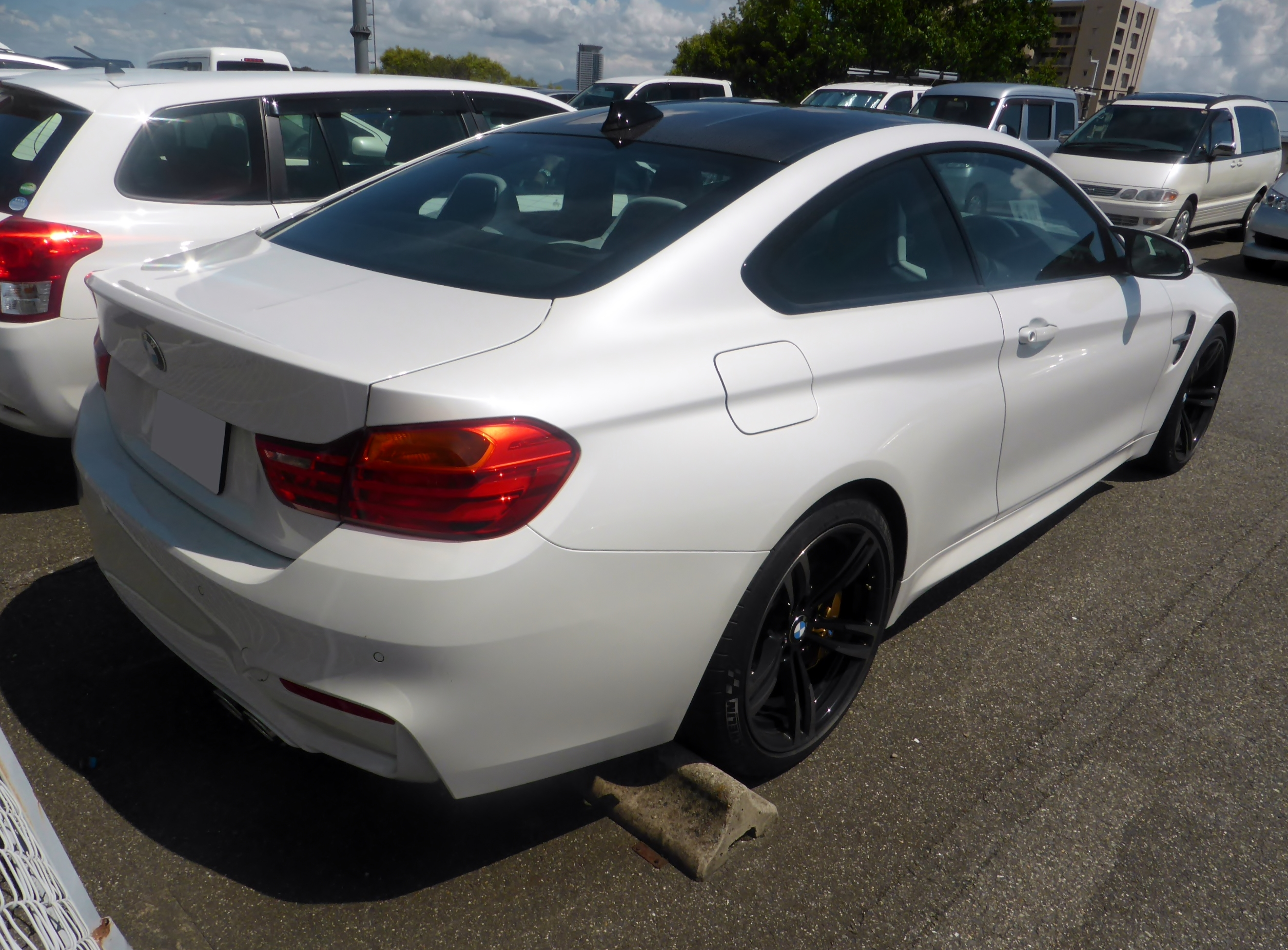 F82型BMW・M4クーペをリアから撮影。